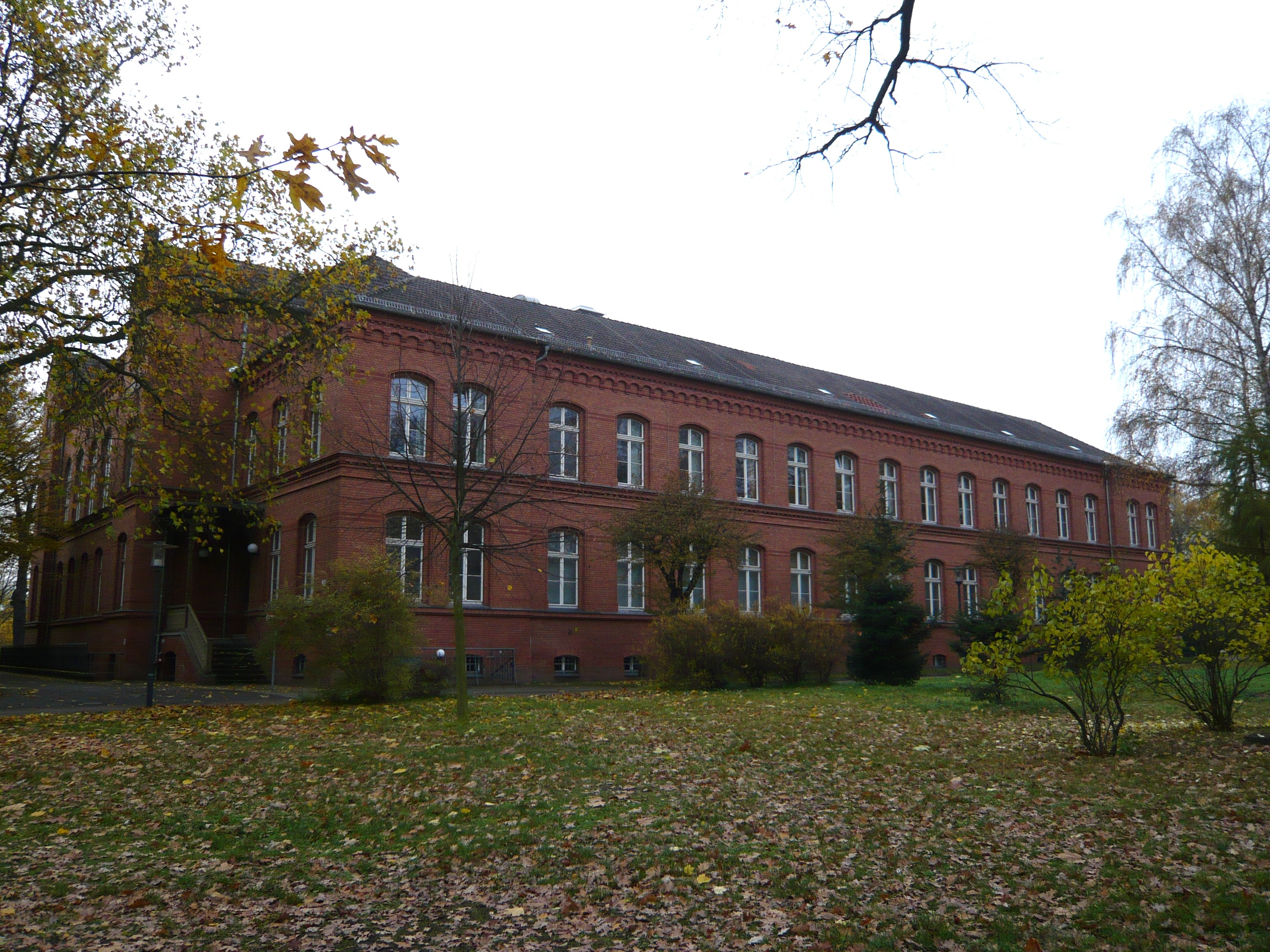 neben dem Wilhelm-Griesinger-Krankenhaus: Augenklinik (2)